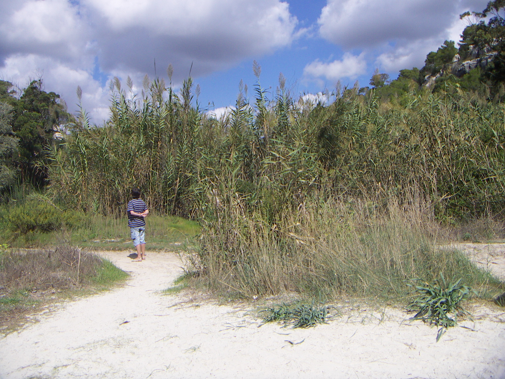 Macarella autor Jordi Coll Costa Jordi coll costa 10:30, 24 November 2006 (UTC)